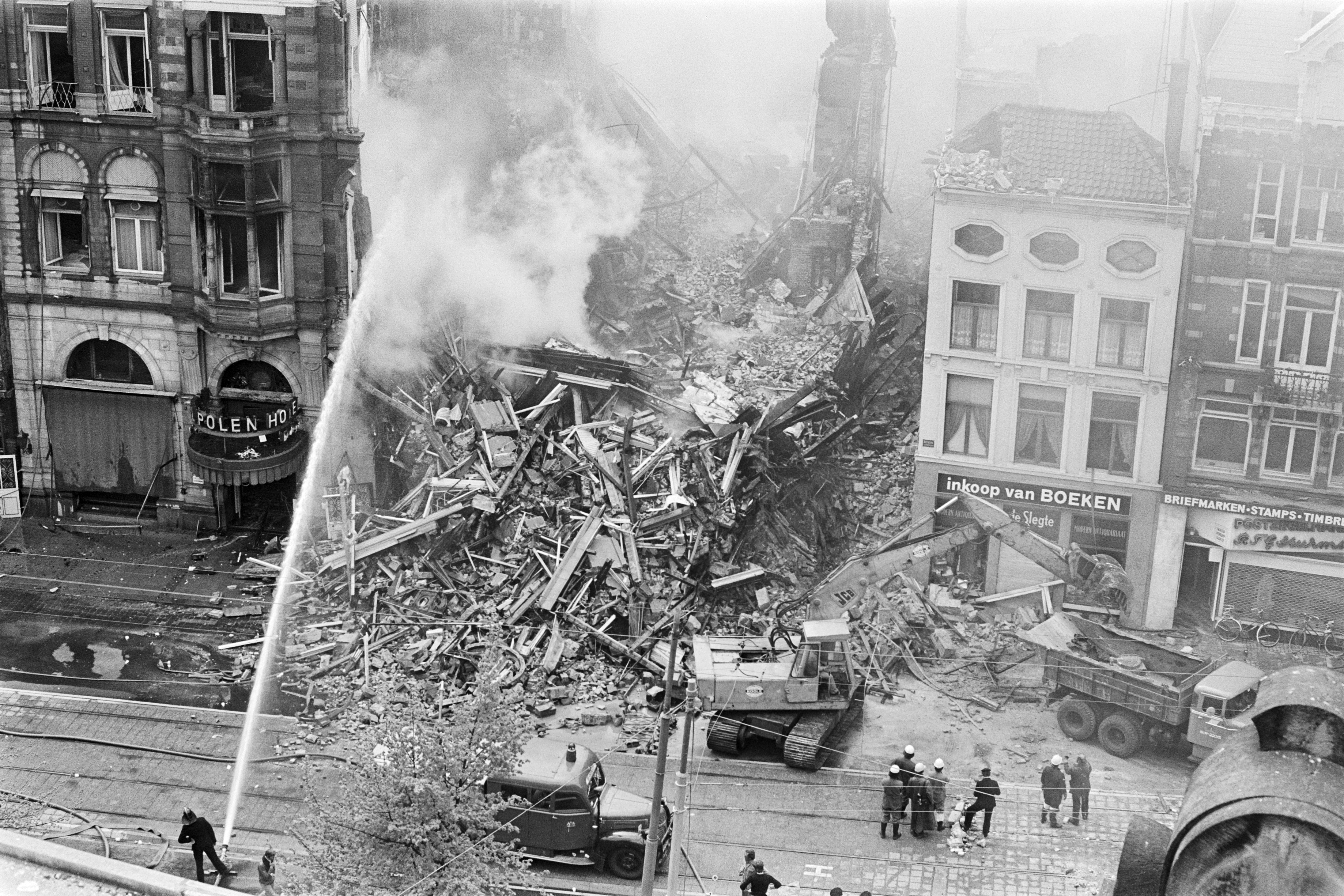 Grote brand in Hotel Polen in Amsterdam; overzicht ingestort hotel